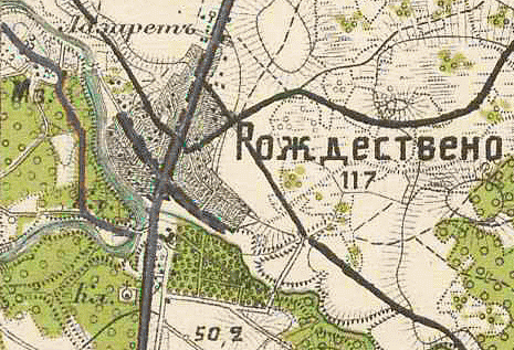 Рождествено на карте района манёвров 1913 года.